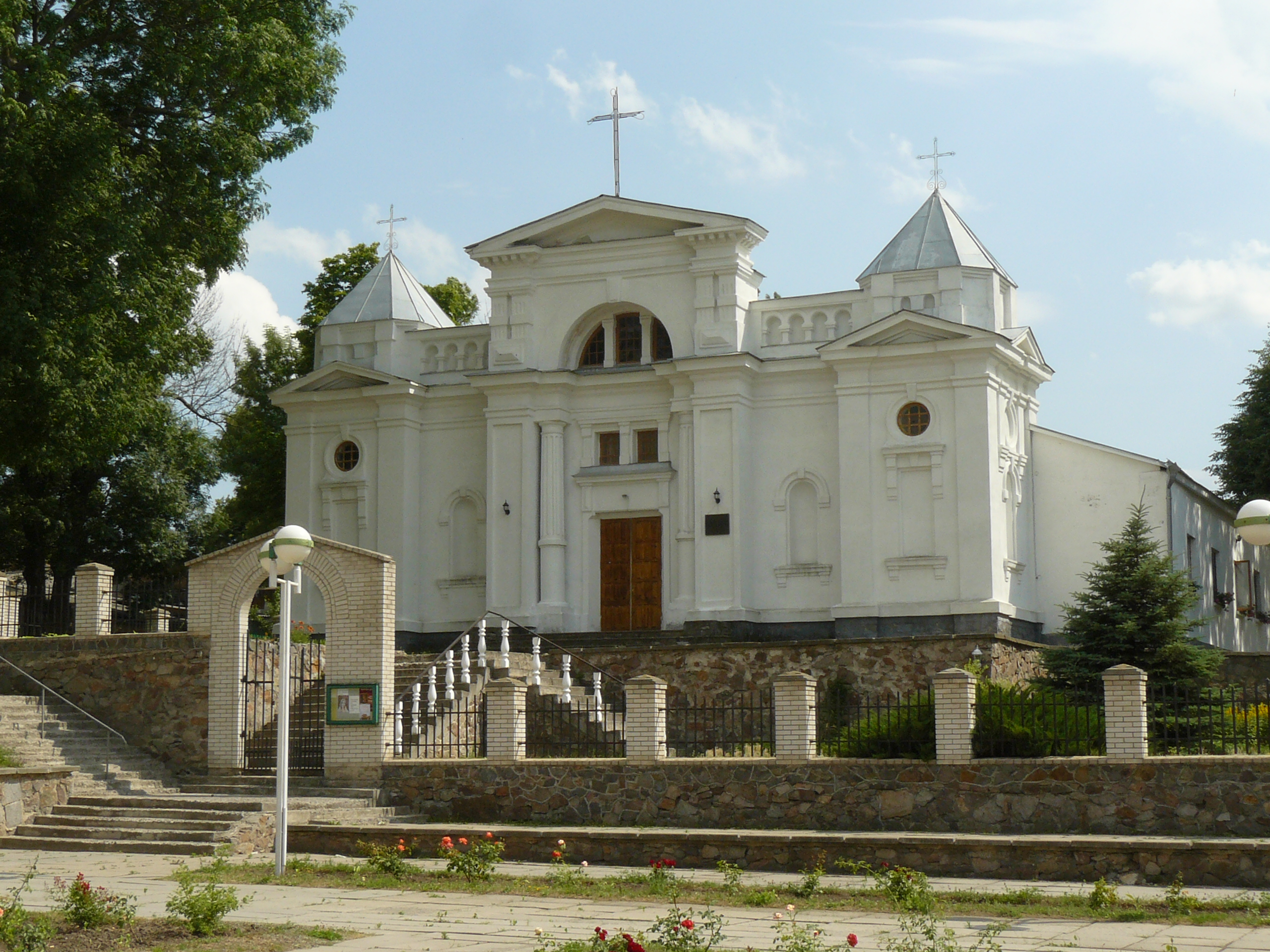 Костел, у якому вінчались батьки Джозефа Конрада (Юзефа Теодора Коженьовського)